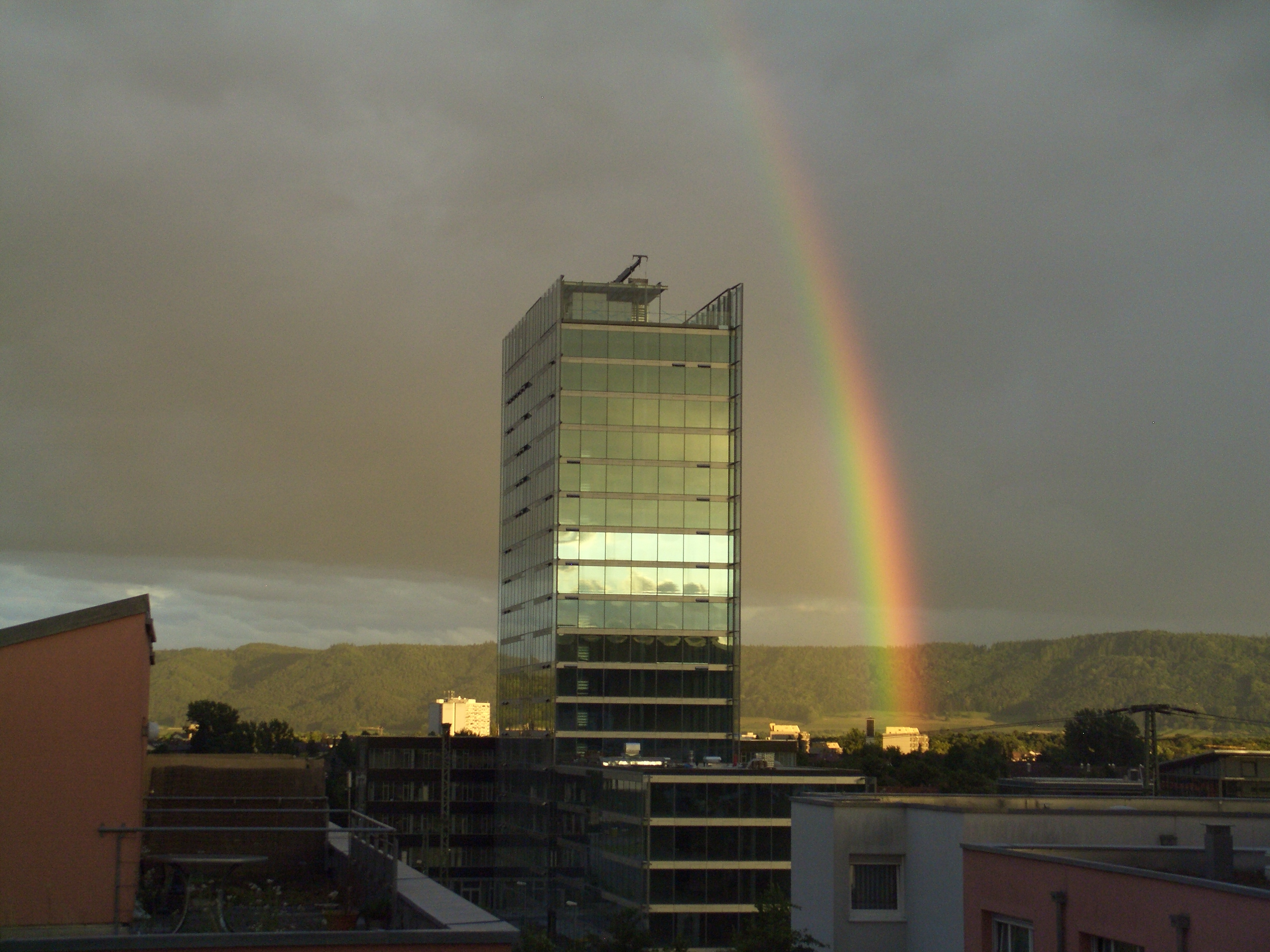 Hegau-Tower, 78224 Singen, Deutschland, mit Regenbogen Hegau-Tower, office-building, Singen/Germany, with rainbow